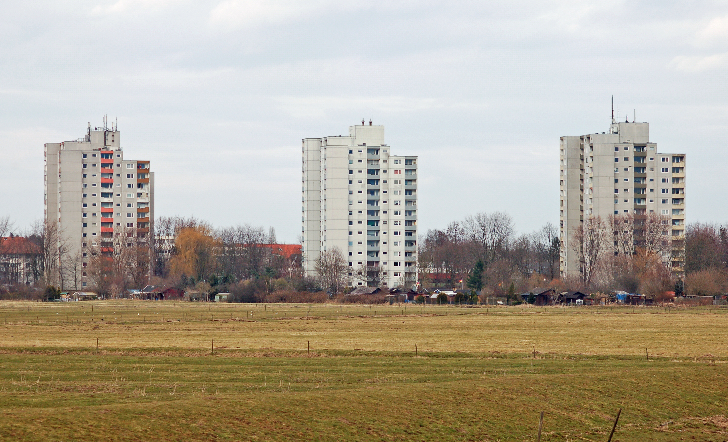 Die Hochhäuser "An der Klosterkoppel" in Uetersen